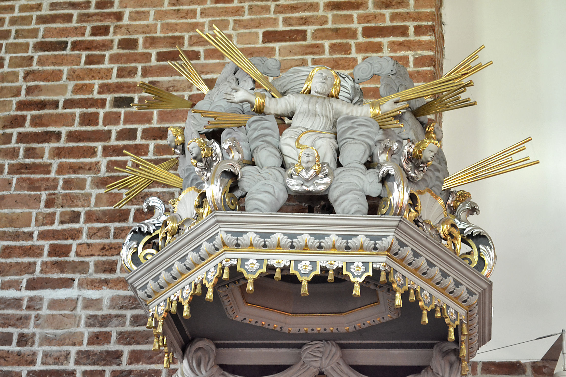 Marianowo - zespół klasztorny cystersów